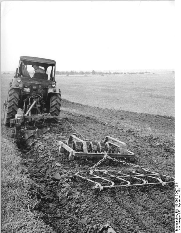 LPG Seelow, Saatbettvorbereitung Zentralbild Krueger krue 15.9.1965 Saatland für die Winterzwischenfrucht wird hier auf einem Schlag der LPG "Hammer und Sichel" in Seelow vorbereitet.